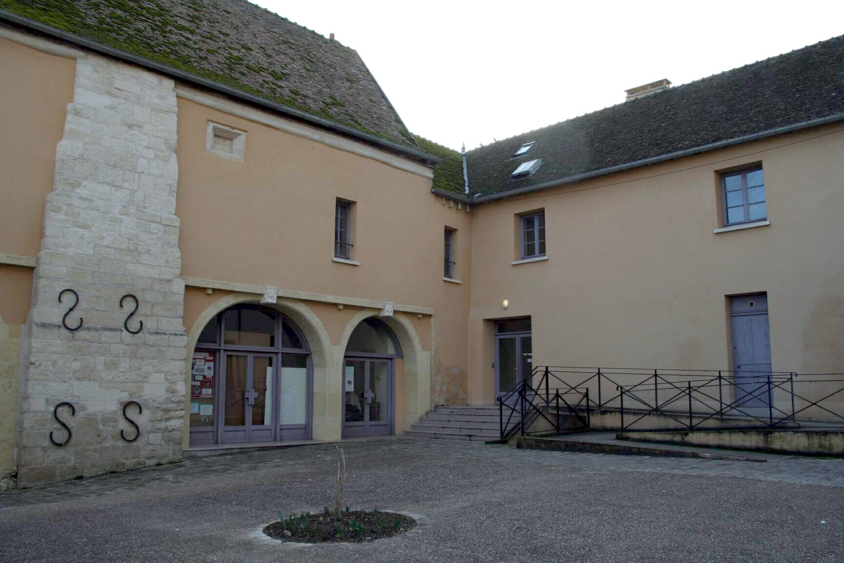 Musée Aubert à Maule - Yvelines (France)